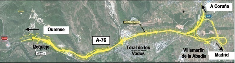 A-76 Tramo I, Proyecto Constructivo (Expediente de Información Pública), vista general de tramo.